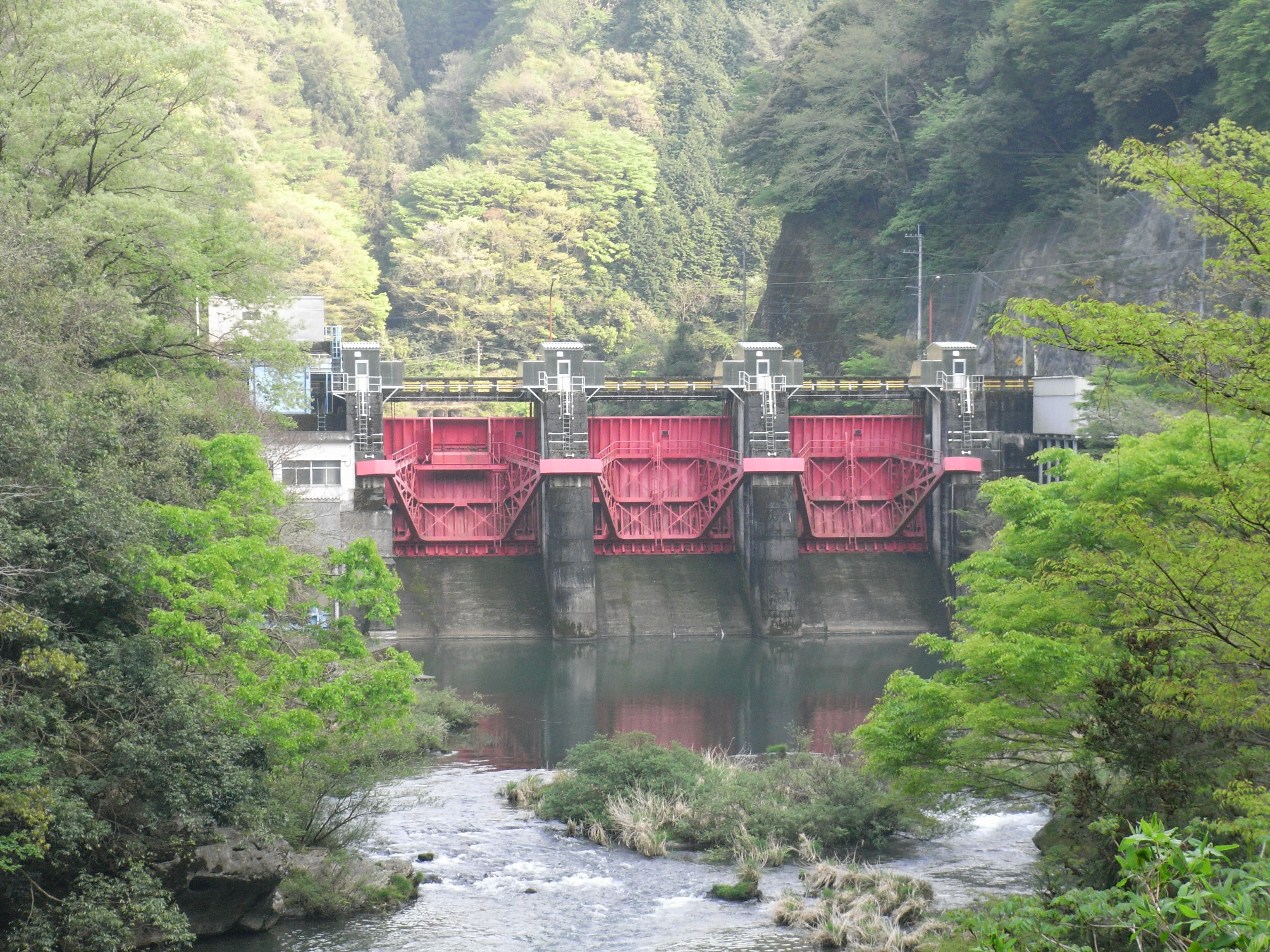 Dam